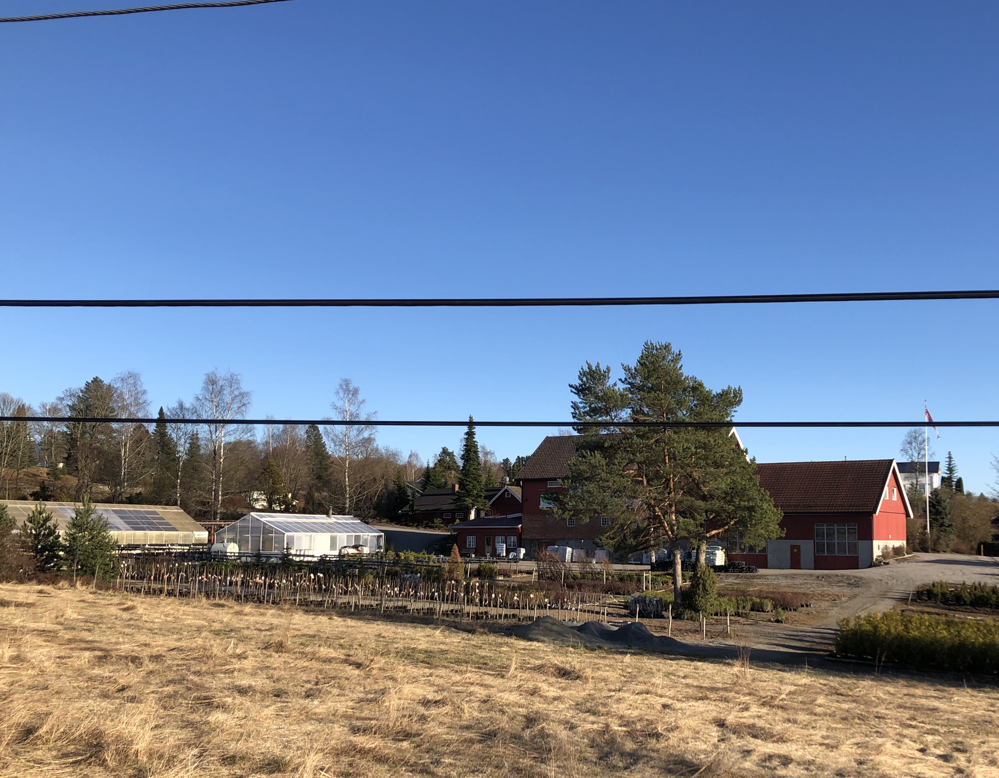 Klekken gartneri og hagesenter, Borgergata 13, Ringerike